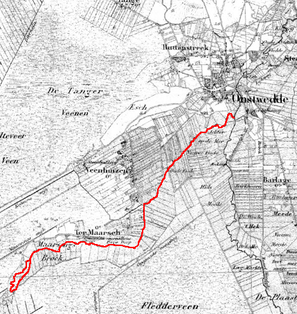 Kaart omgeving Onstwedde - de loop van het Pagediep rood ingekleurd door uploader